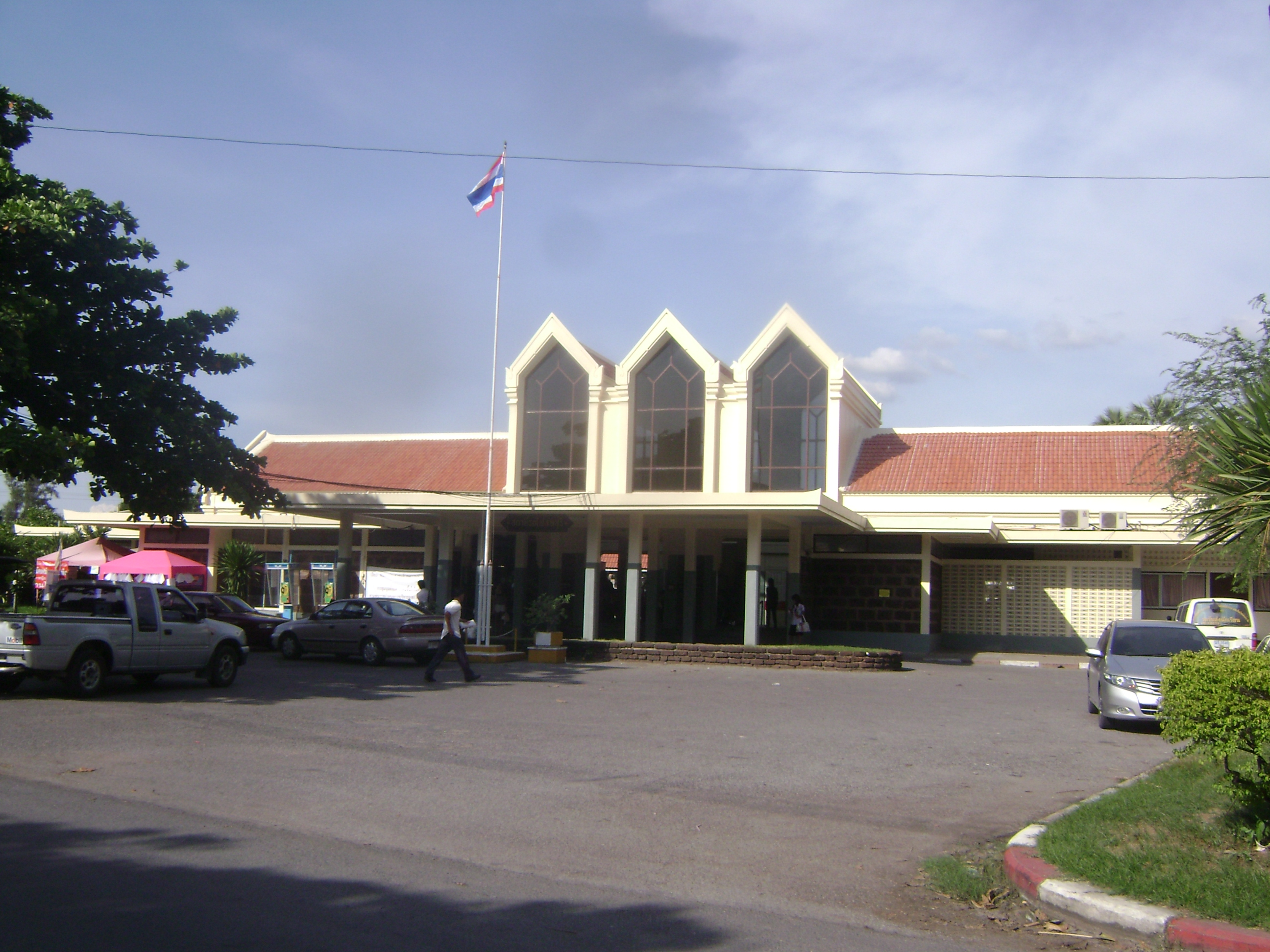 สถานีรถไฟลพบุรี อำเภอเมืองลพบุรี จังหวัดลพบุรี